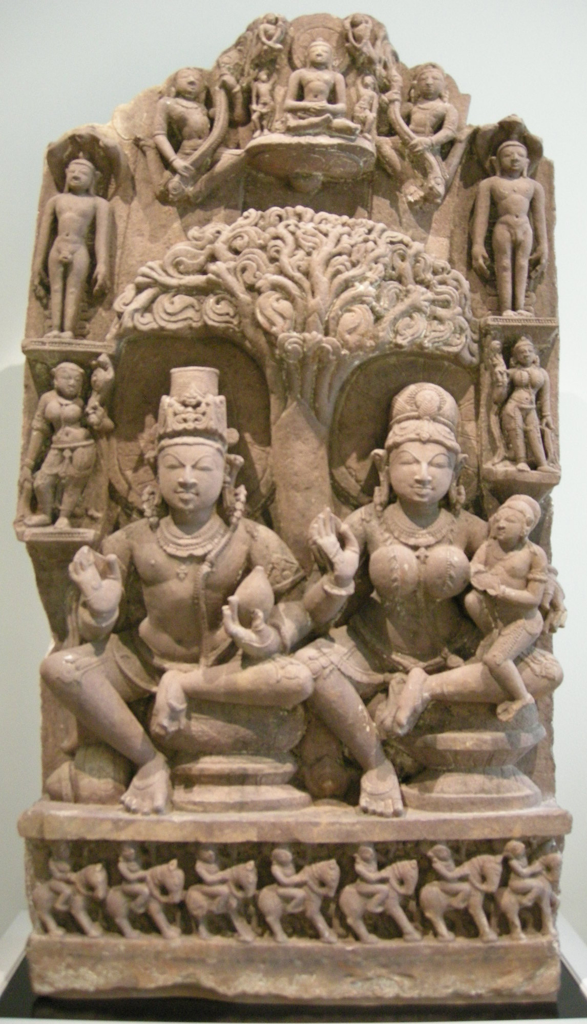 india, madhya pradesh, stele con yaksha-yakshini e jinas, XI sec.